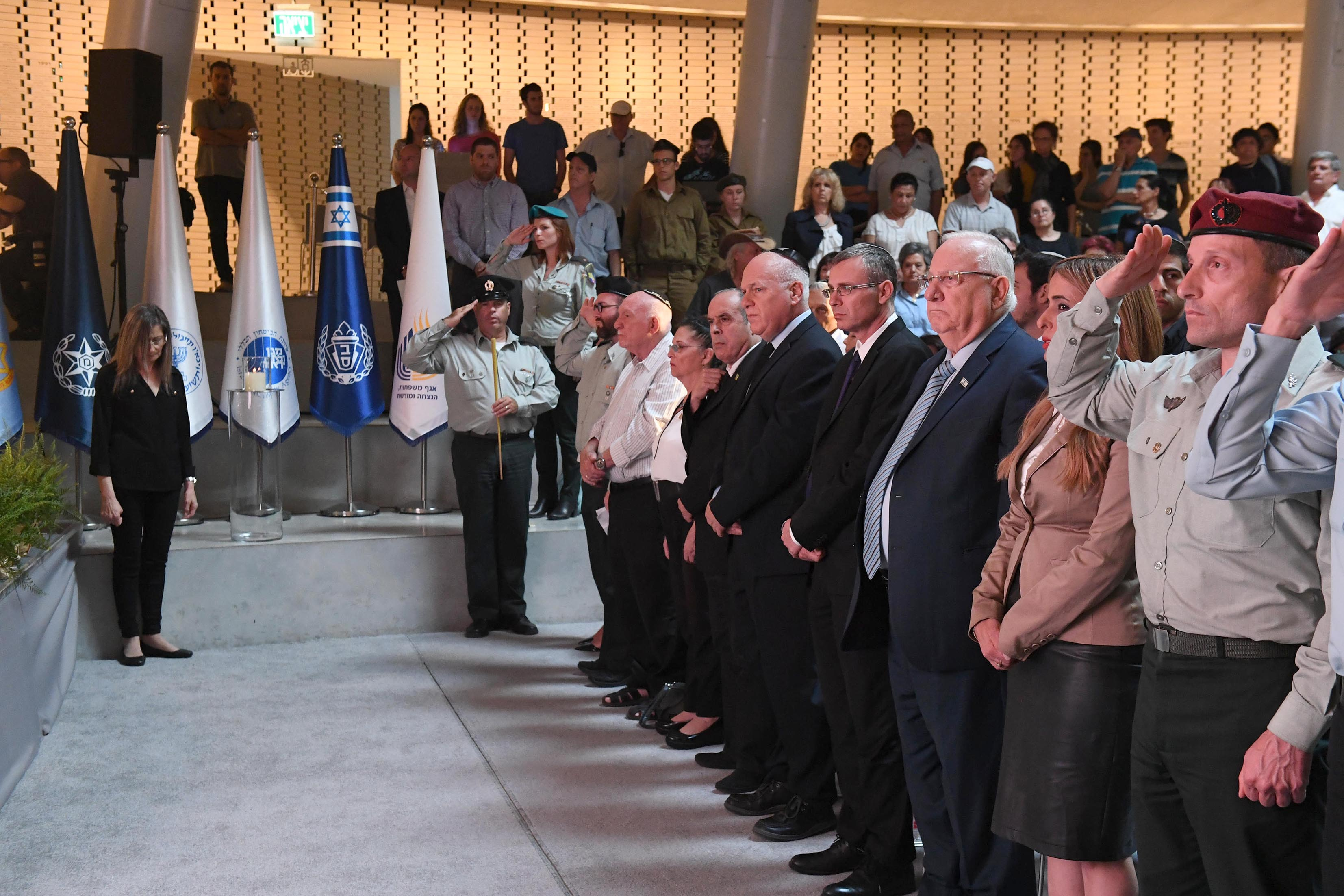 ראובן ריבלין נשיא מדינת ישראל בטקס זיכרון לחללי מלחמת לבנון הראשונה שהתקיים בהיכל הזיכרון הממלכתי לחללי מערכות ישראל בהר הרצל